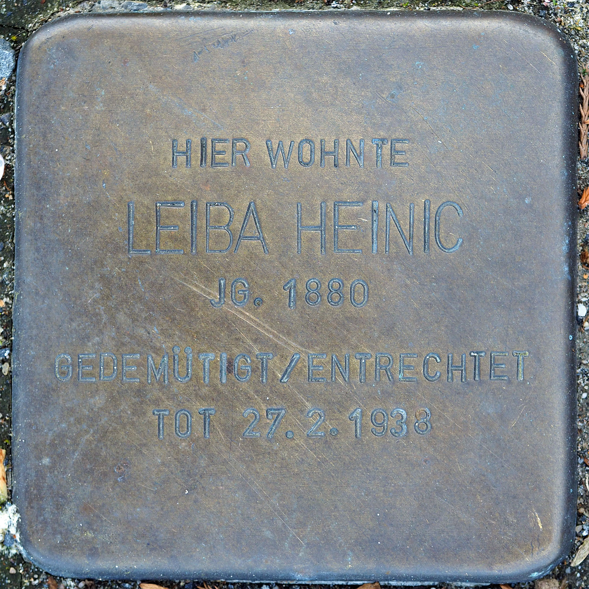 Stolpersteine MG: Heinic, Leiba